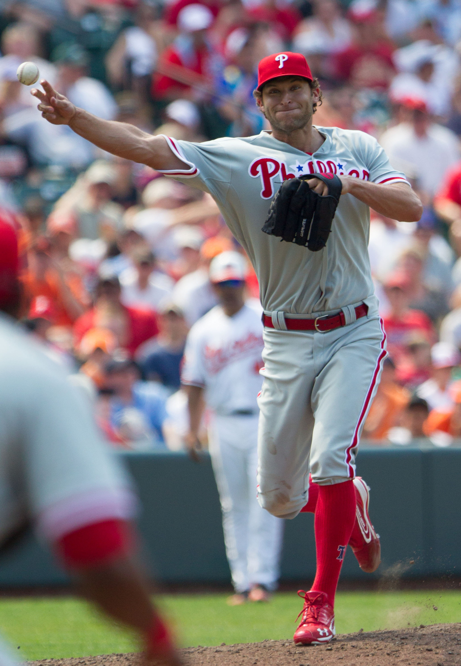 Michael Schwimer